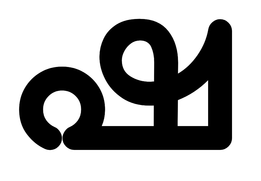 ഷ മലയാളം അക്ഷരം